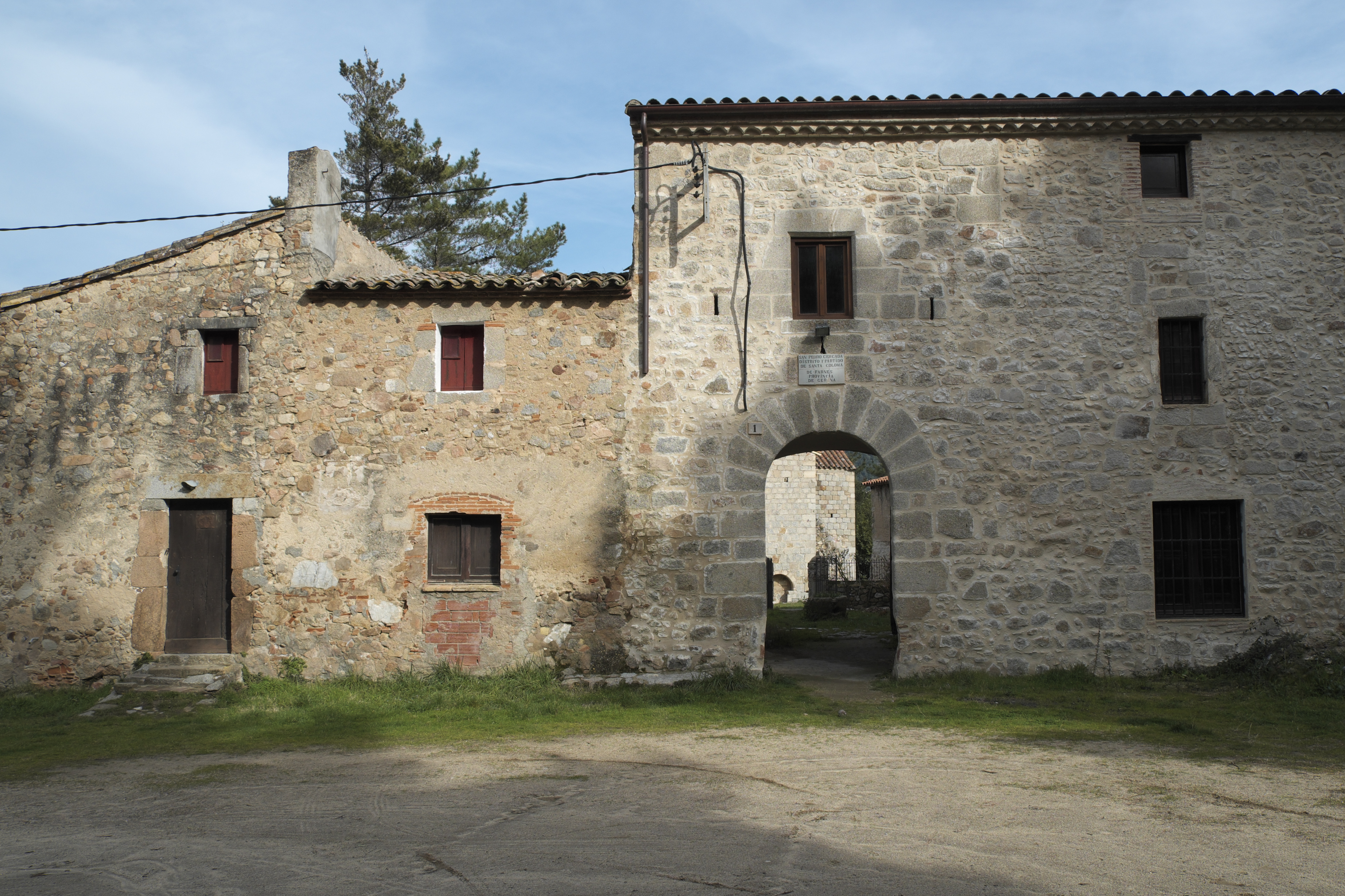 Ehemaliges Kloster Sant Pere Cercada in Santa Coloma de Farners in der Provinz Girona (Katalonien/Spanien)